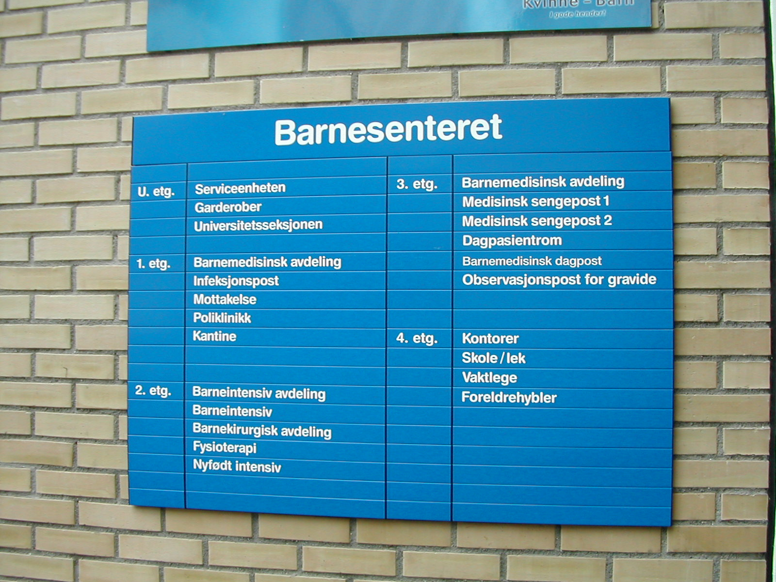 Skilt på det gamle Barnesenteret.